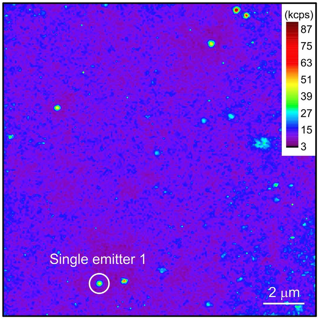 Germanium-vacancy center in diamond, luminescence map